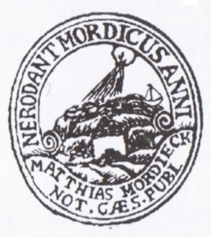 Notariats-Siegel von Matthias Mohrdieck aus dem Jaht 1756 .